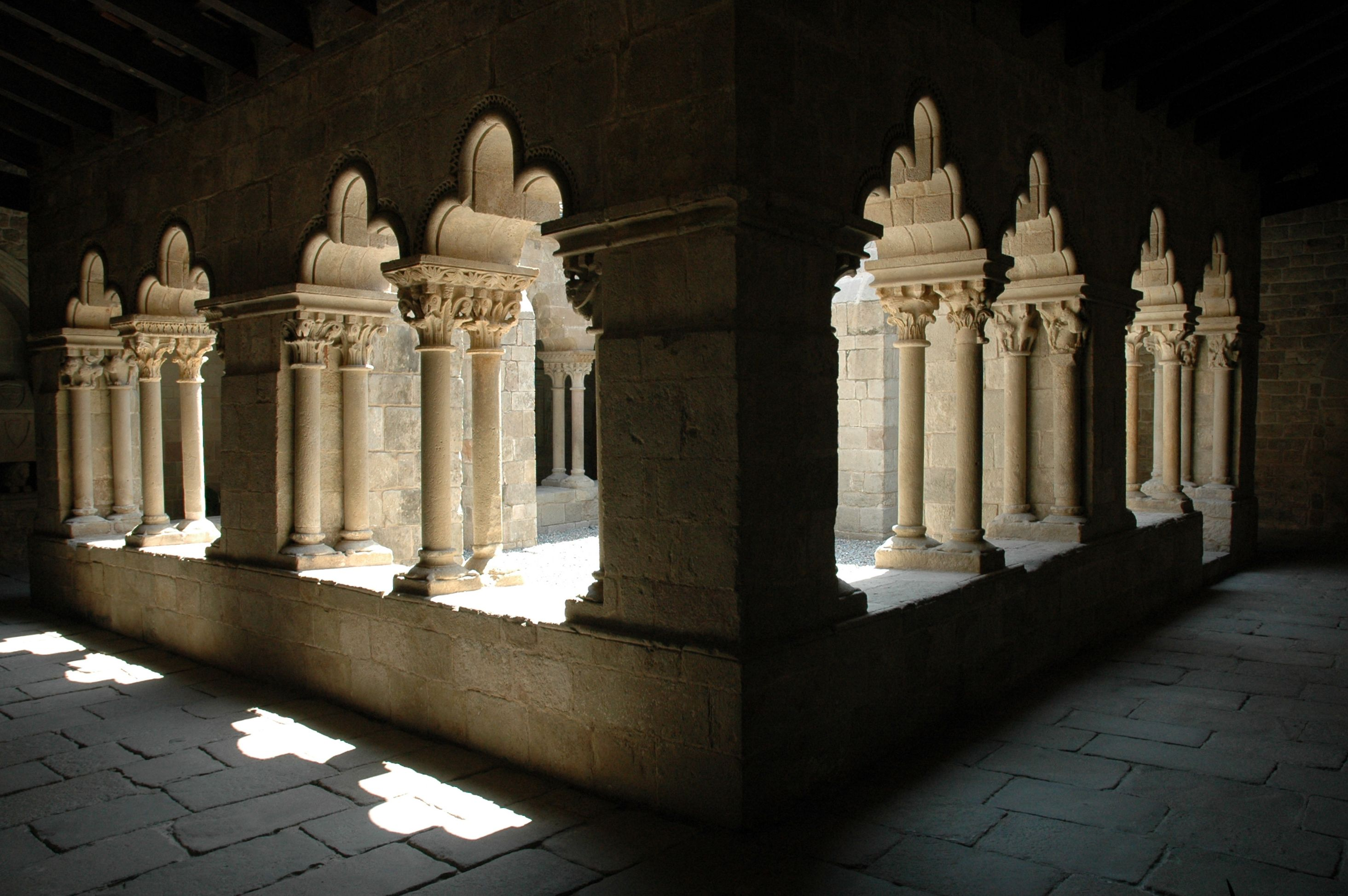 Sant Pau del Camp - Claustre